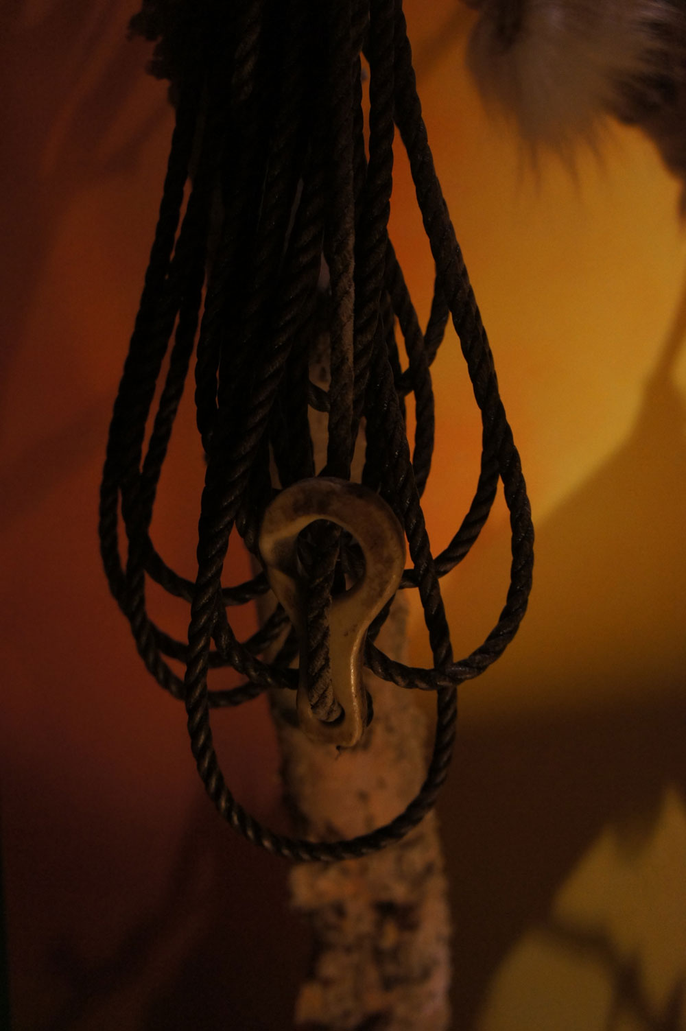 Äldre samiskt lasso tillverkat av rep.Davvisámegiella: Suohpan Ájtte-musea čoakkáldagas